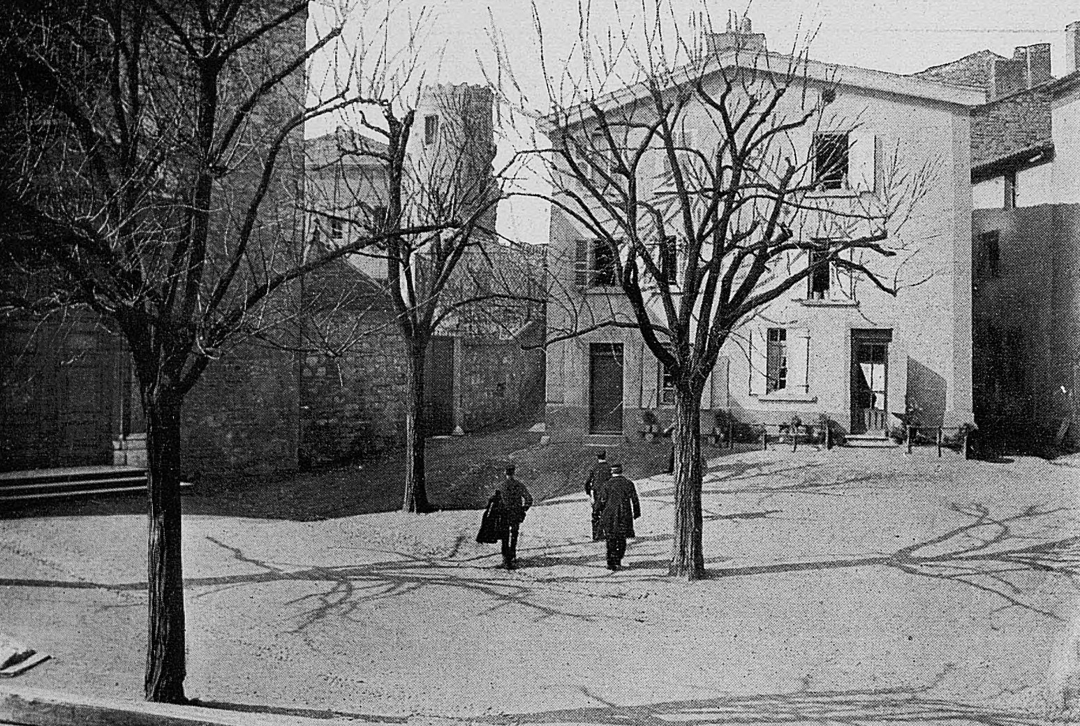 Dictionnaire illustré des communes du département du Rhône. Tome 1 / par MM. E. de Rolland et D. Clouzet.